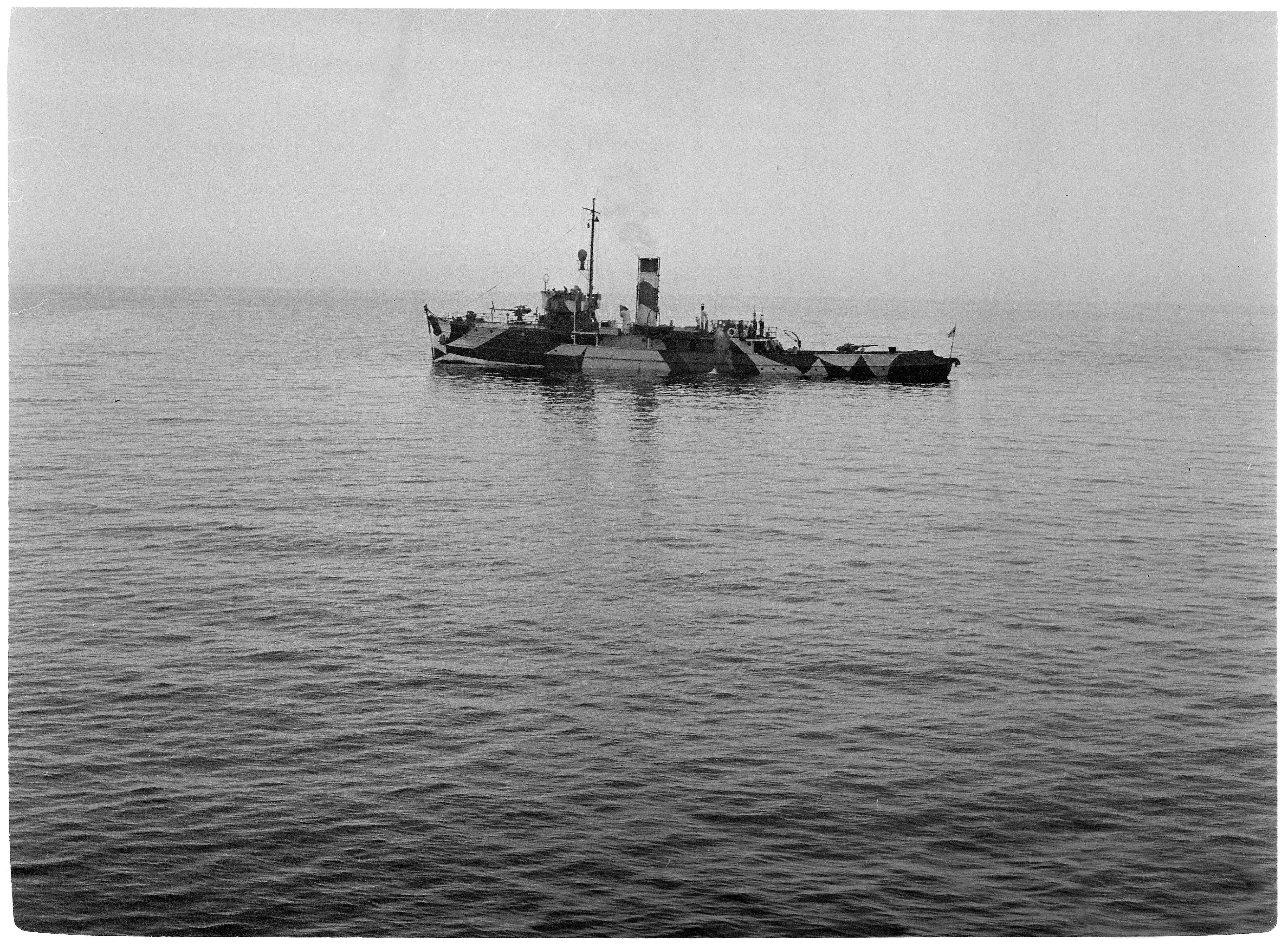 Tykkivene Turunmaa.